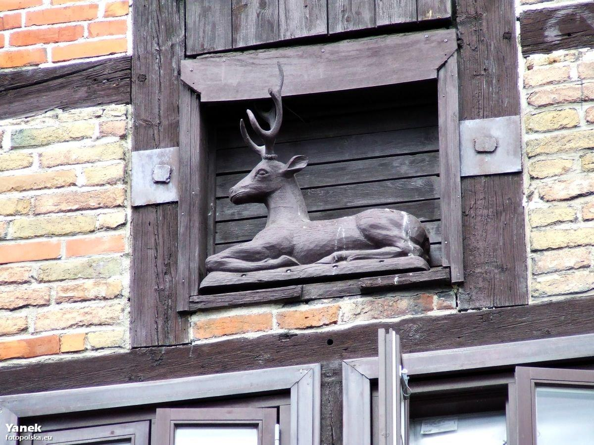 Symbol budynku.